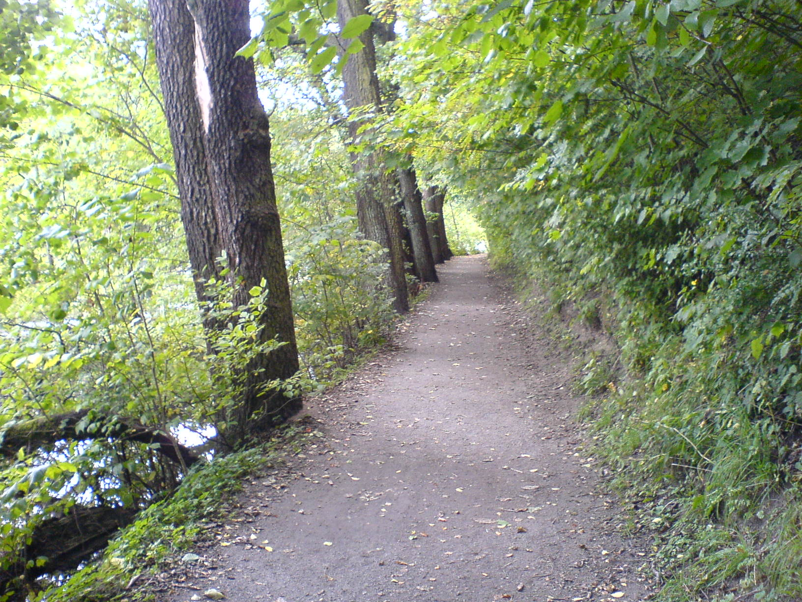 Åbackarna i Norrköping september 2007. Norra sidan.